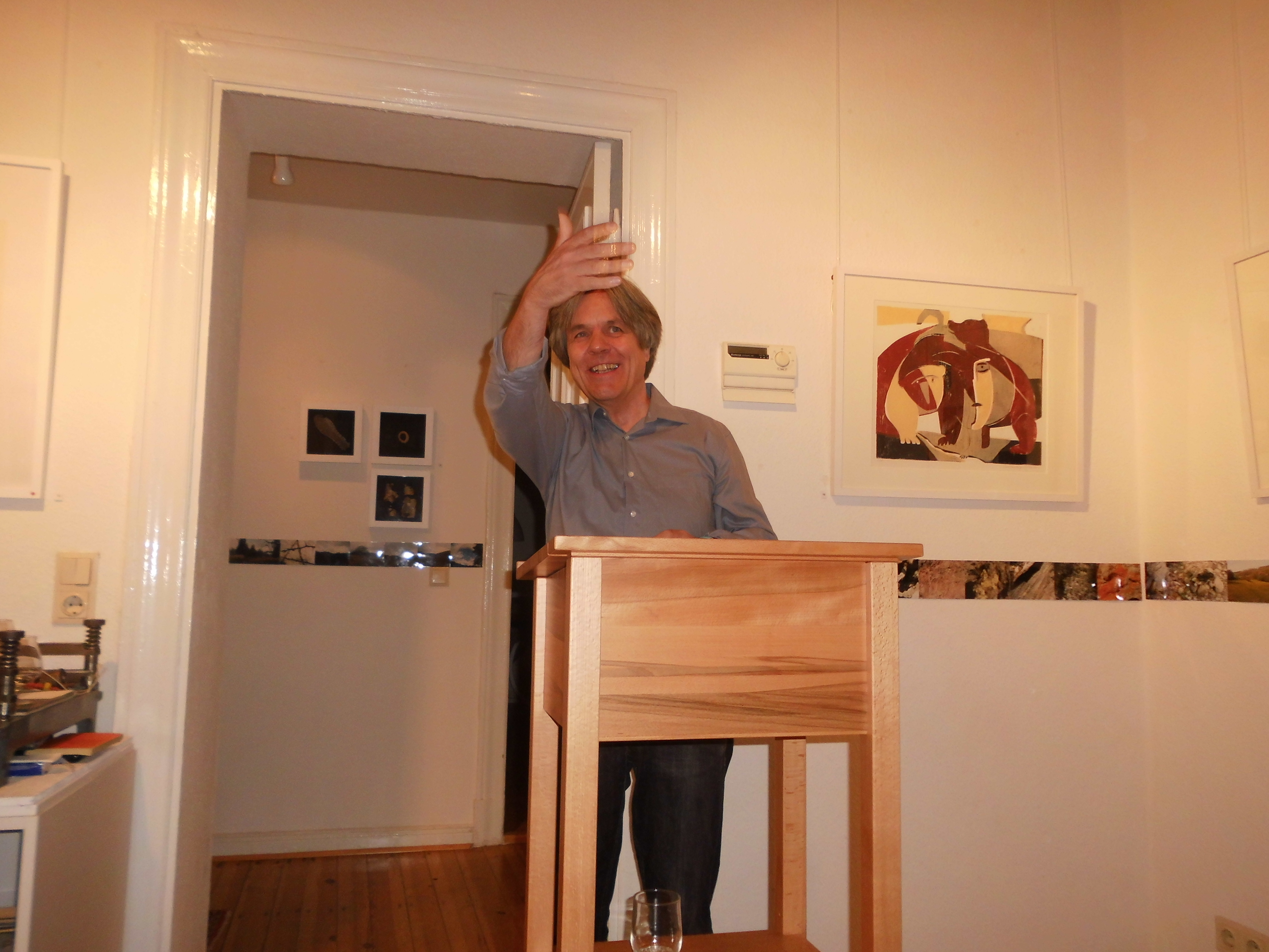 Volker Kaminski bei einer öffentlichen Lesung in einer Galerie in Berlin Moabit